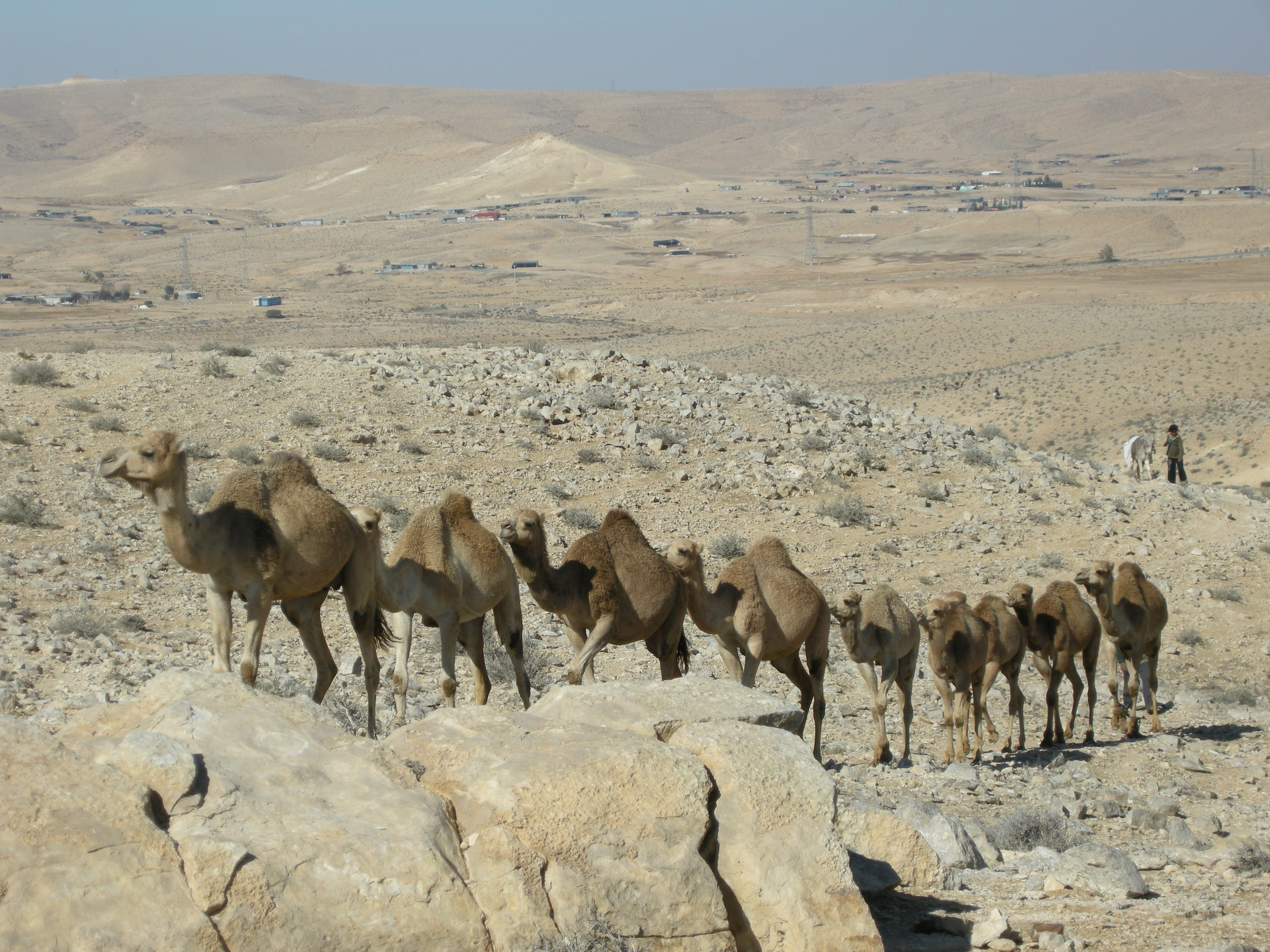 Camels_caravan